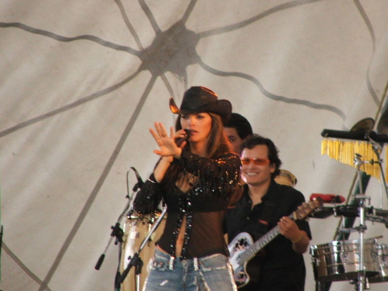 Ana Bárbara en 2005.